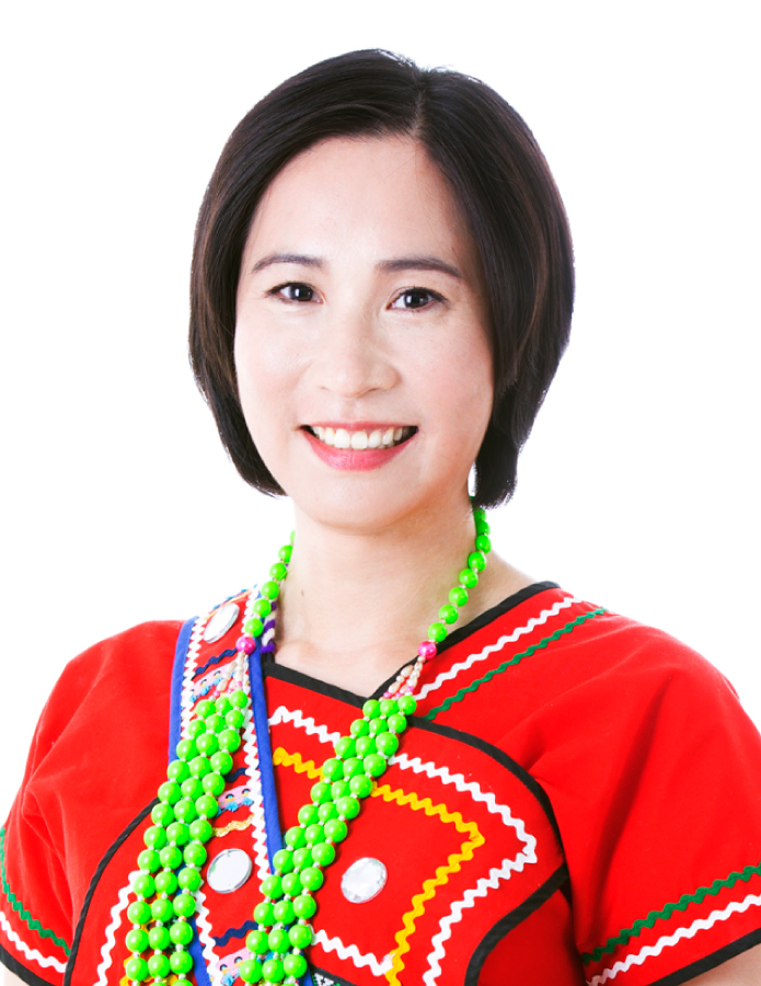 高潞·以用·巴魕剌